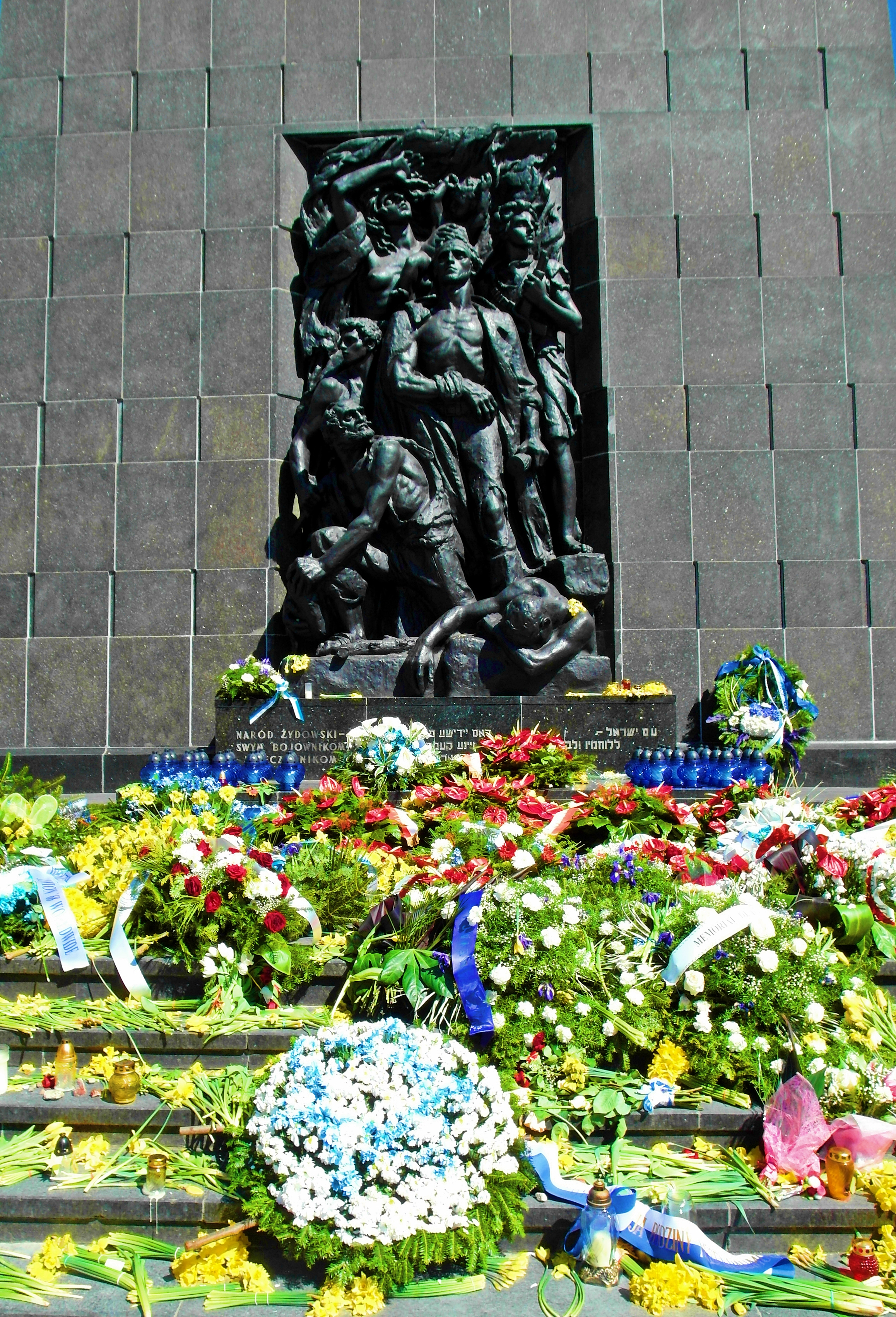 70. rocznica Powstania w Getcie Warszawskim Pomnik Bohaterów Getta